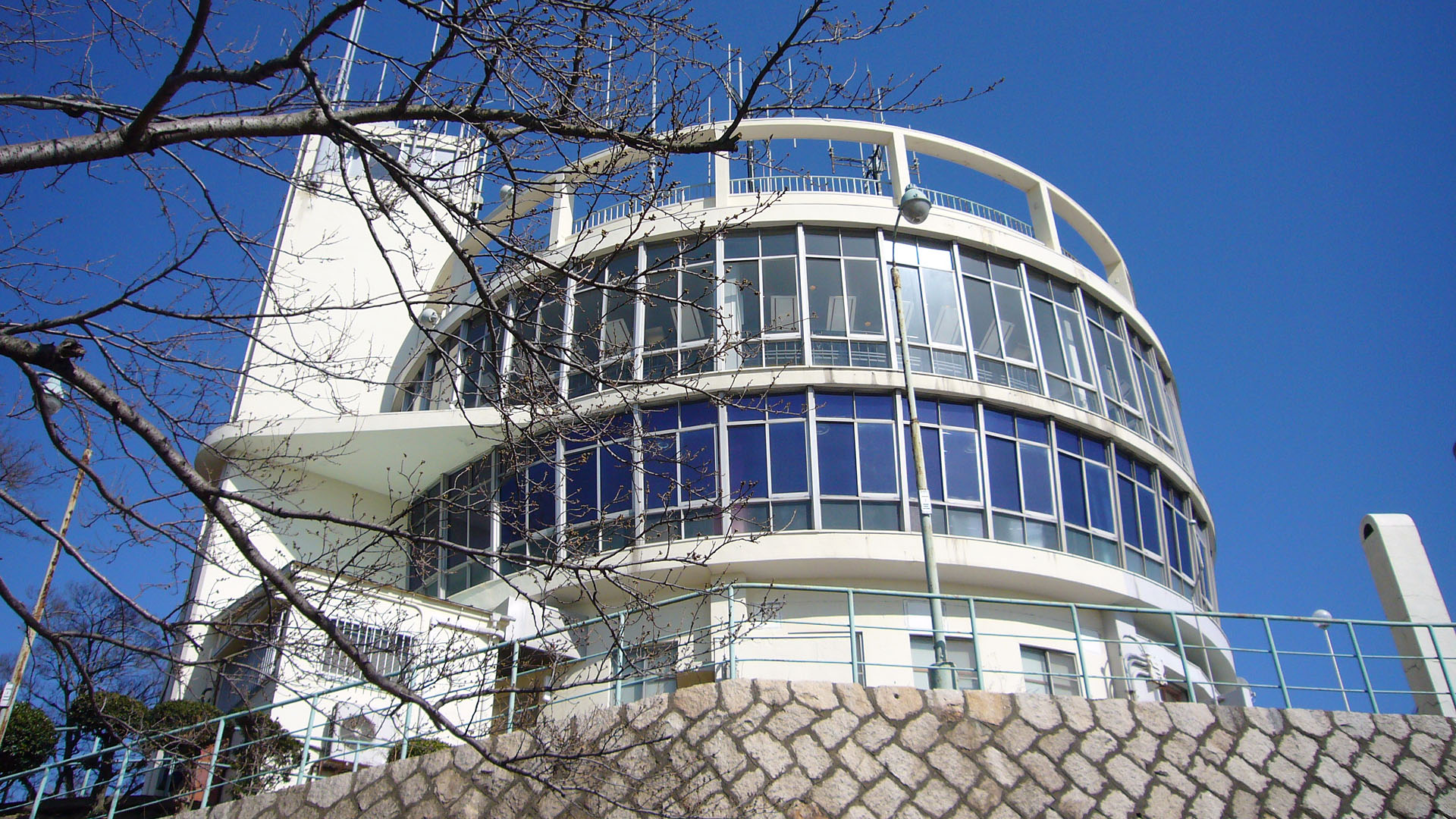 Sumaura Sanjo Amusement Park in Kobe, Japan